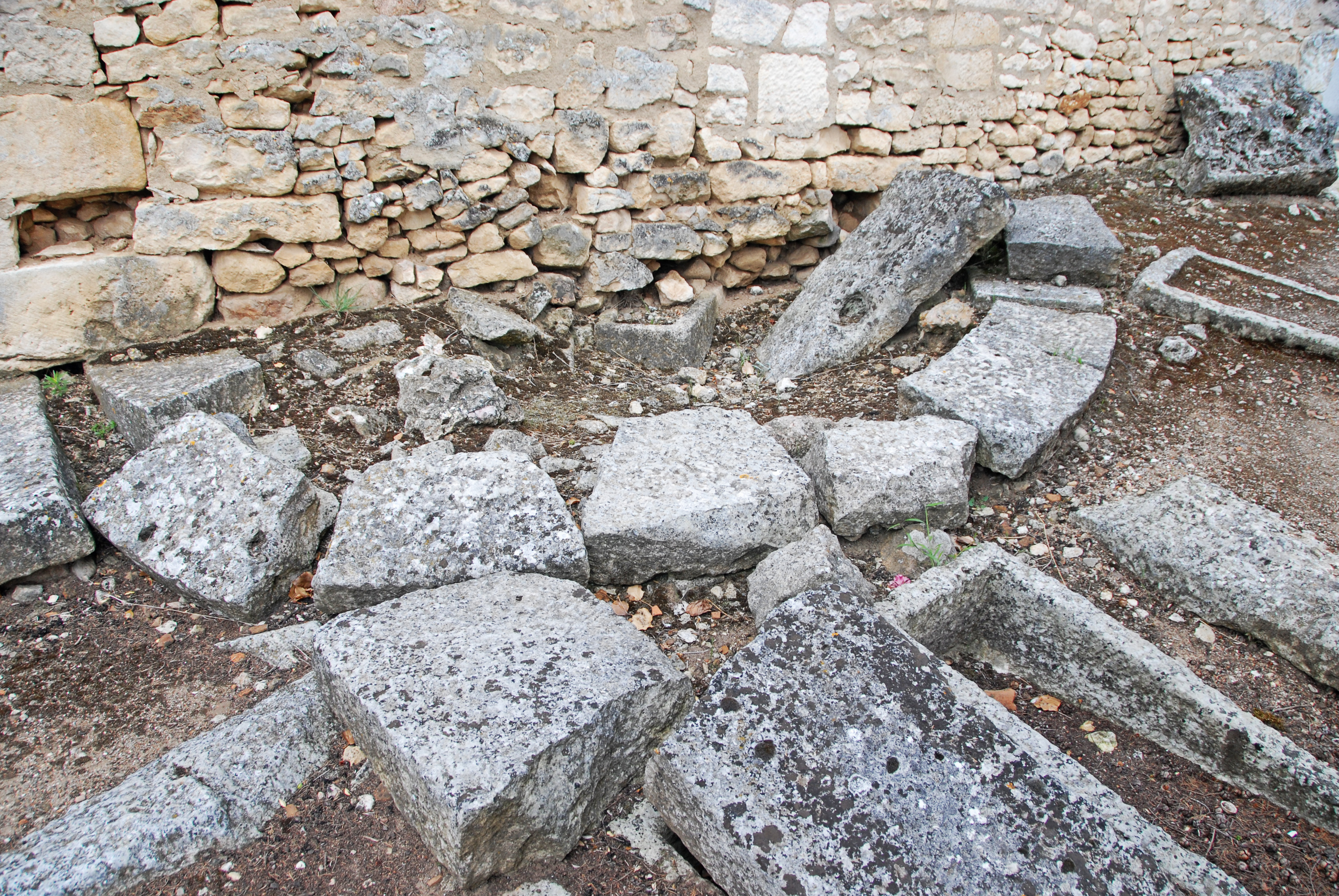 Civaux, Nekropole,Kapelle, Apsisfundament